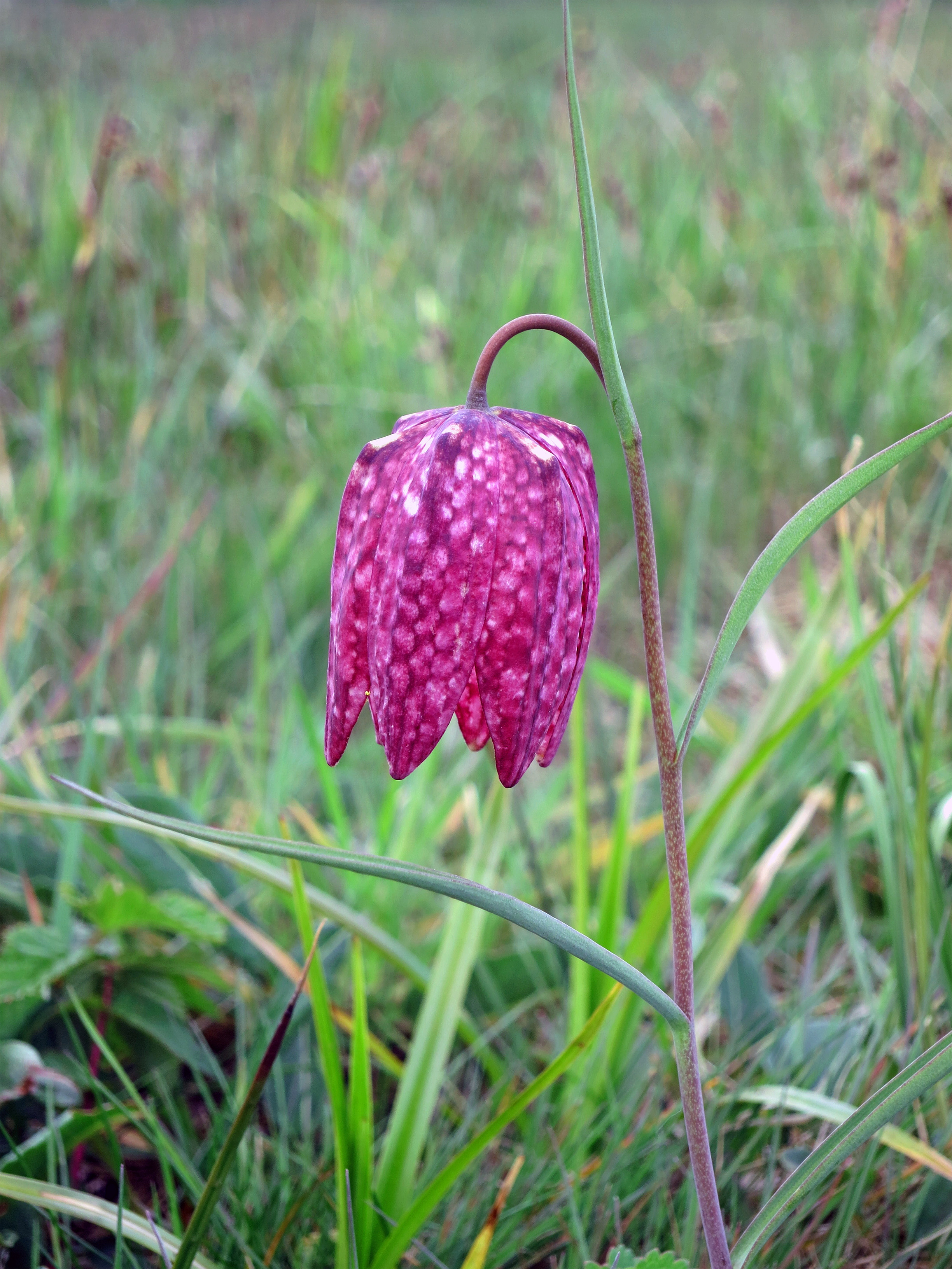 Schachblume (Fritillaria meleagris), auch Schachbrettblume genannt, ist eine Pflanzenart aus der Familie der Liliengewächse. Sie wächst im Naturschutzgebiet Sinngrund, dem größten Vorkommen in Deutschland, bei Obersinn in den Feuchtwiesen der Sinn. Die Schachblume ist giftig, wird etwa 15 bis 20 Zentimeter groß und blüht von April bis Mai. Sie ist in Deutschland stark gefährdet und gilt nach der Bundesartenschutzverordnung als besonders geschützt. Nennesnwerte Bestände gibt es neben dem Sinngrund nur noch an der Unterelbe bei Hamburg und östlich der Elbe in der Nähe der Stadt Zieser.